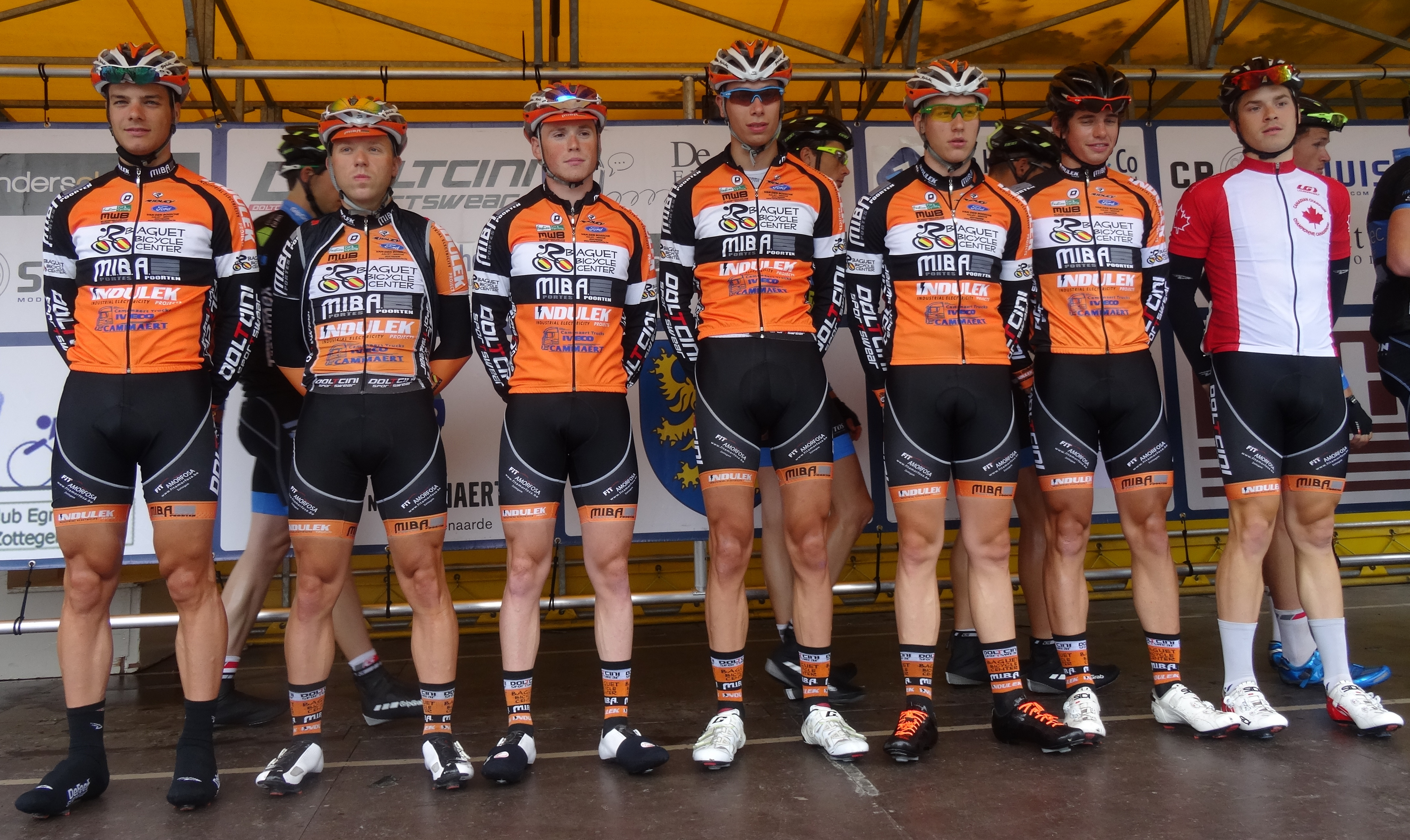 Reportage photographique réalisé le samedi 5 juillet à l'occasion du départ et de l'arrivée du Circuit Het Nieuwsblad espoirs 2014 à Grotenberge (Zottegem), Belgique.